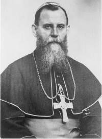 Bischof Josef Loerks, Neuguinea